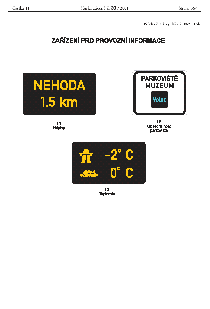 Česká zařízení pro provozní informace podle vyhlášky ministerstva vnitra č. 30/2001 Sb., kterou se provádějí pravidla provozu na pozemních komunikacích a úprava a řízení provozu na pozemních komunikacích.